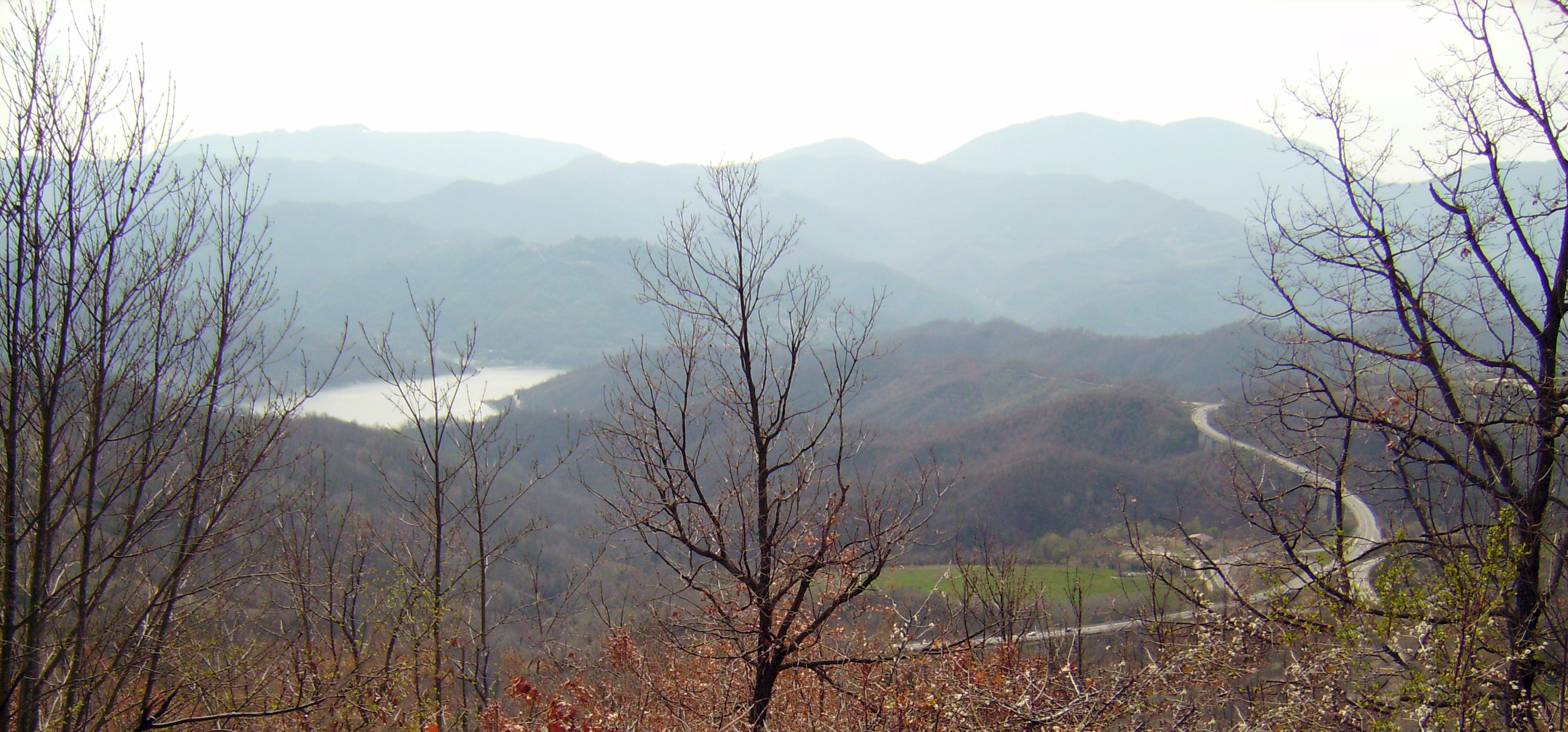 Il lago del Salto e la superstrada Rieti-Torano (strada statale 578), di cui si scorge lo svincolo di Pagliara, fotografati dalla strada provinciale 22 all'altezza di Mercato, frazione di Fiamignano (provincia di Rieti, Lazio).